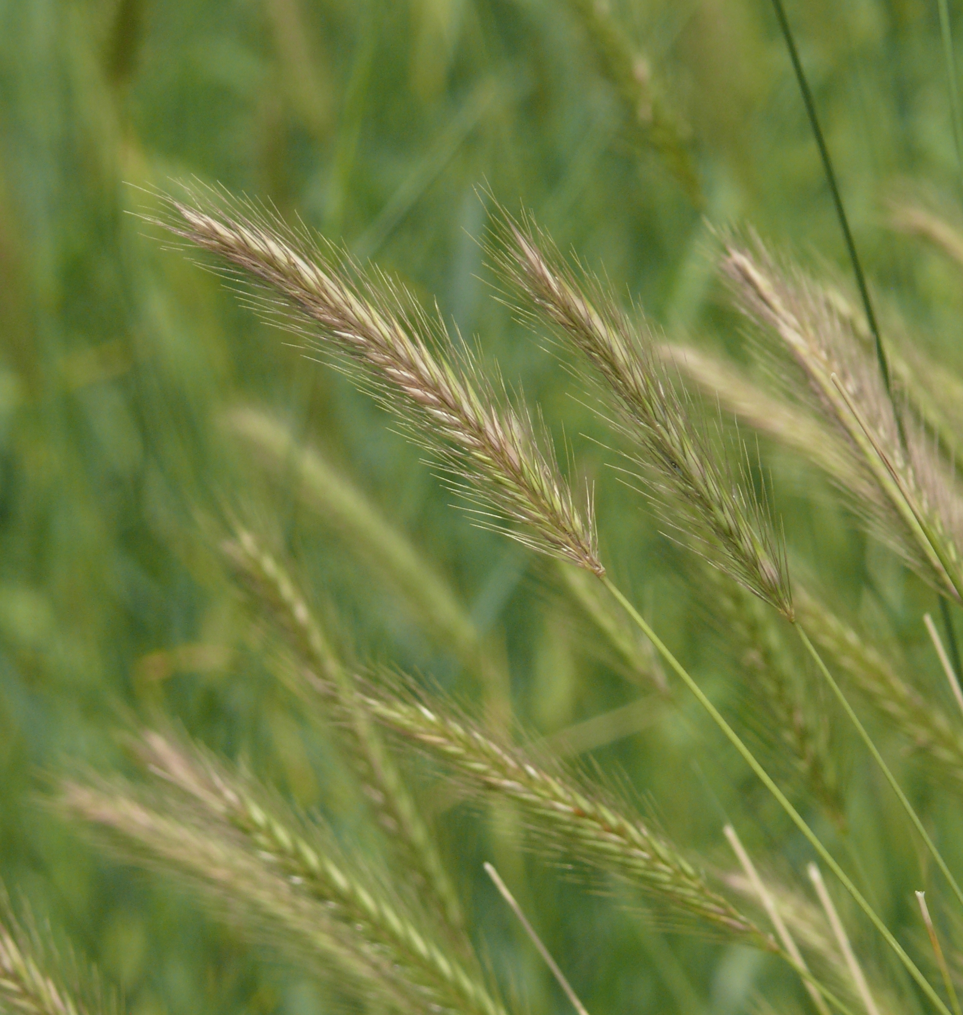 Hordeum secalinum, Hohenlohe